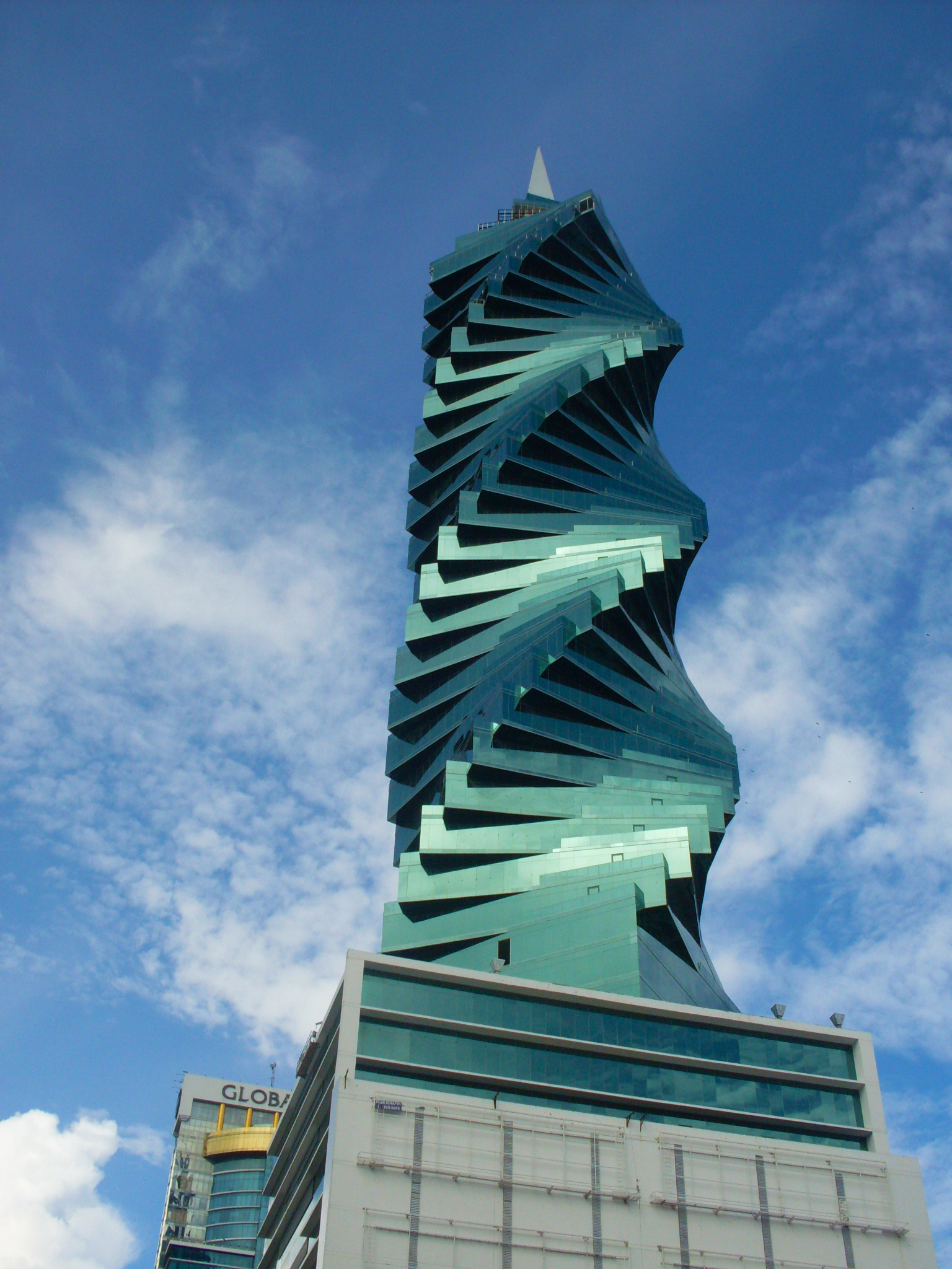 Revolution Tower Panamá, ubicado en Calle 50.